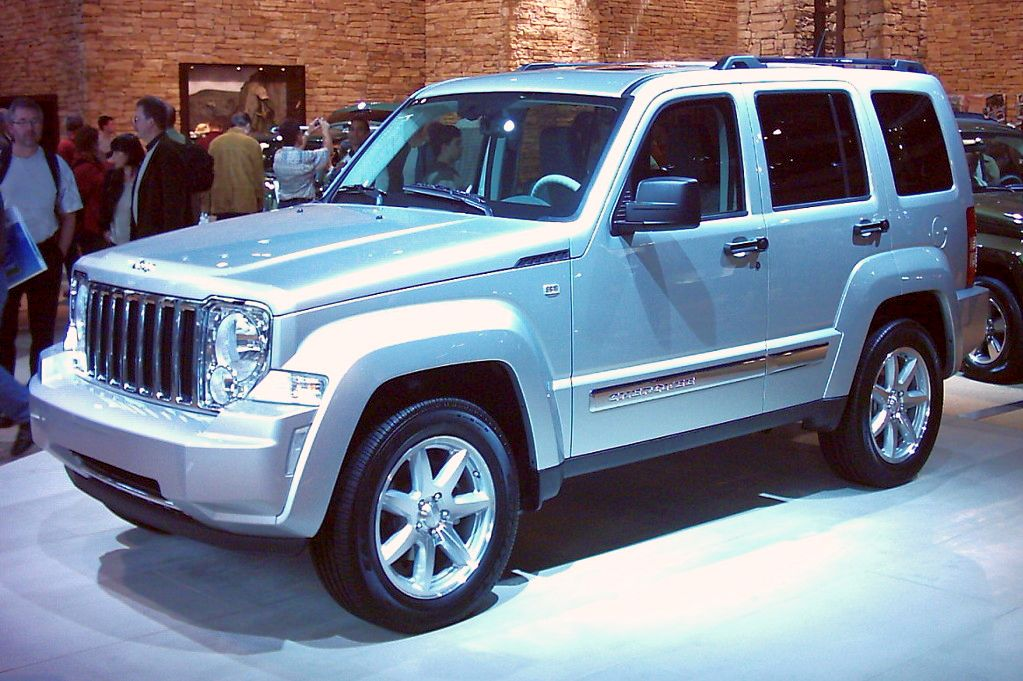 Jeep Cherokee 3.7L